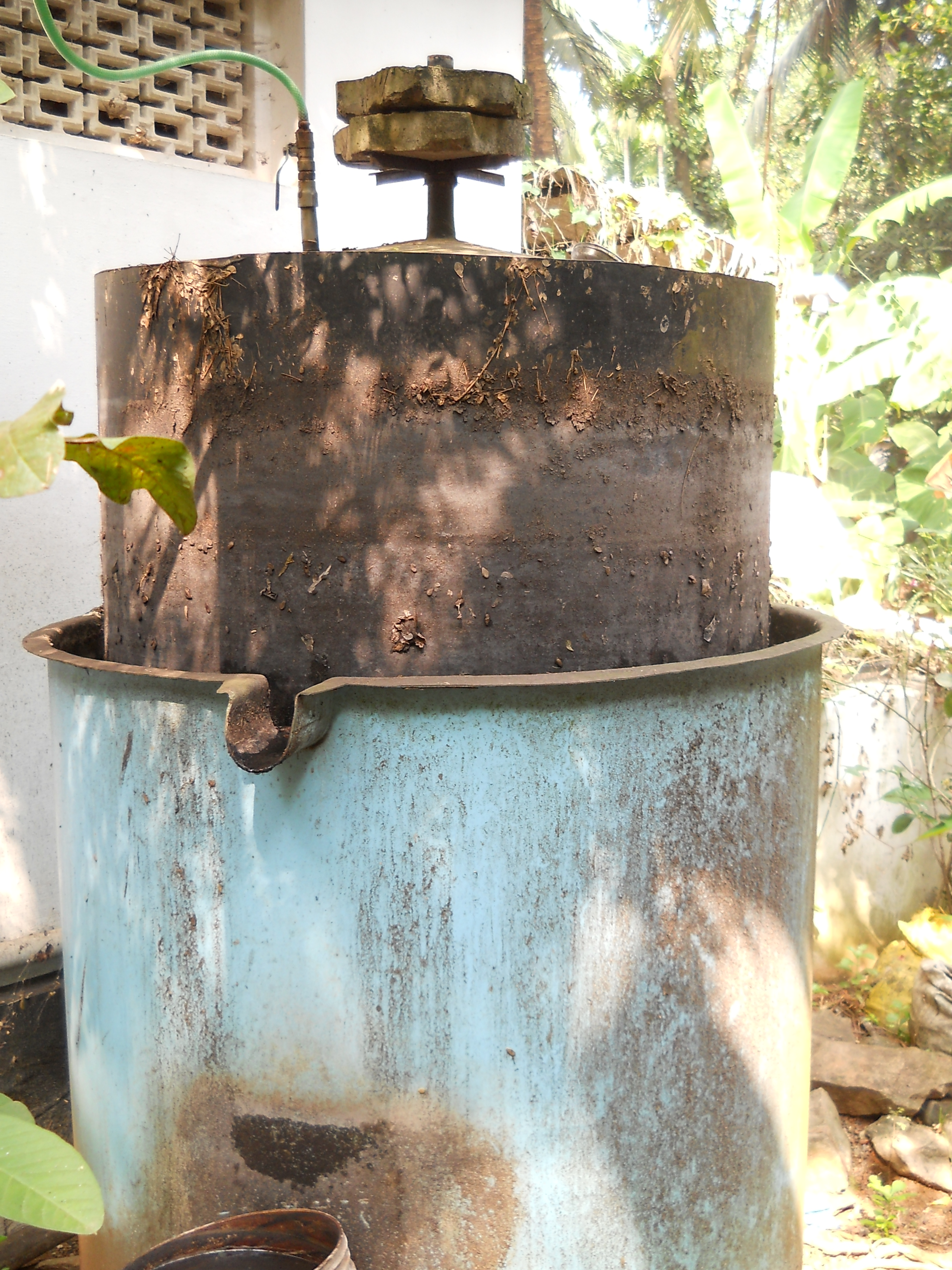 പോര്‍ട്ടബിള്‍ ബയോഗ്യാസ് പ്ലാന്റ്